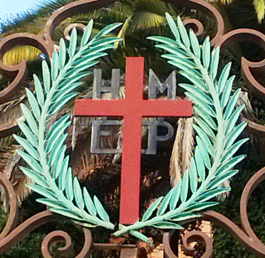 Emblema dels Germans Camils dels Germans Pobres a la casa mare de la congregació, a la reixa d'entrada.